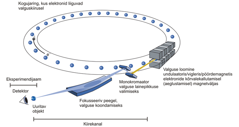 FinestBeams